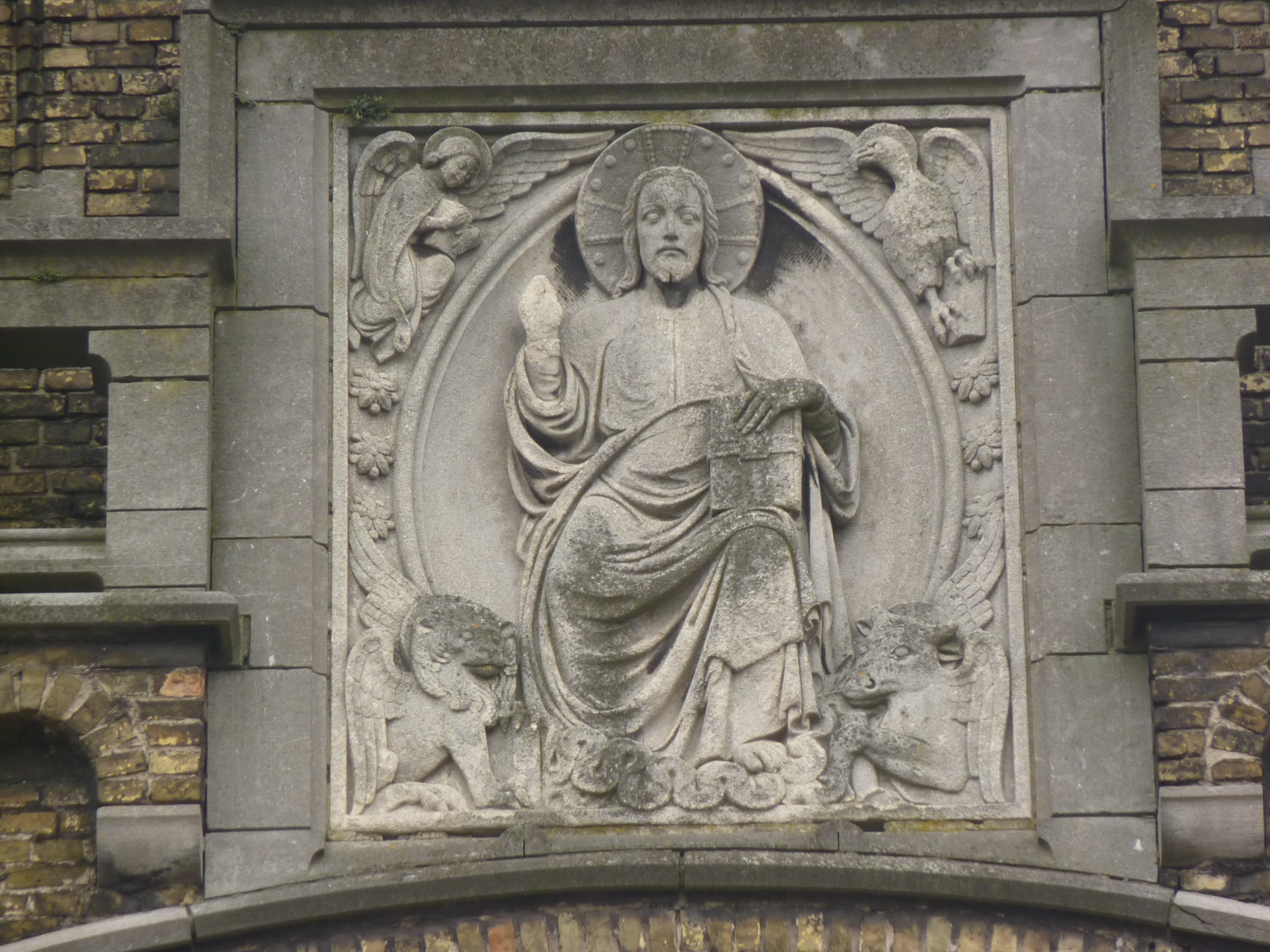 Église Sainte-Thérèse d'Avila à Schaerbeek, Bruxelles, Belgique.